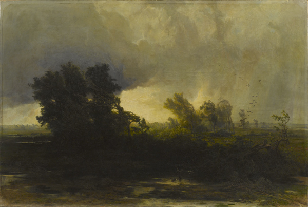 "Un turbine", olio su tela, 98 x 147 cm., Galleria d'arte moderna di Milano